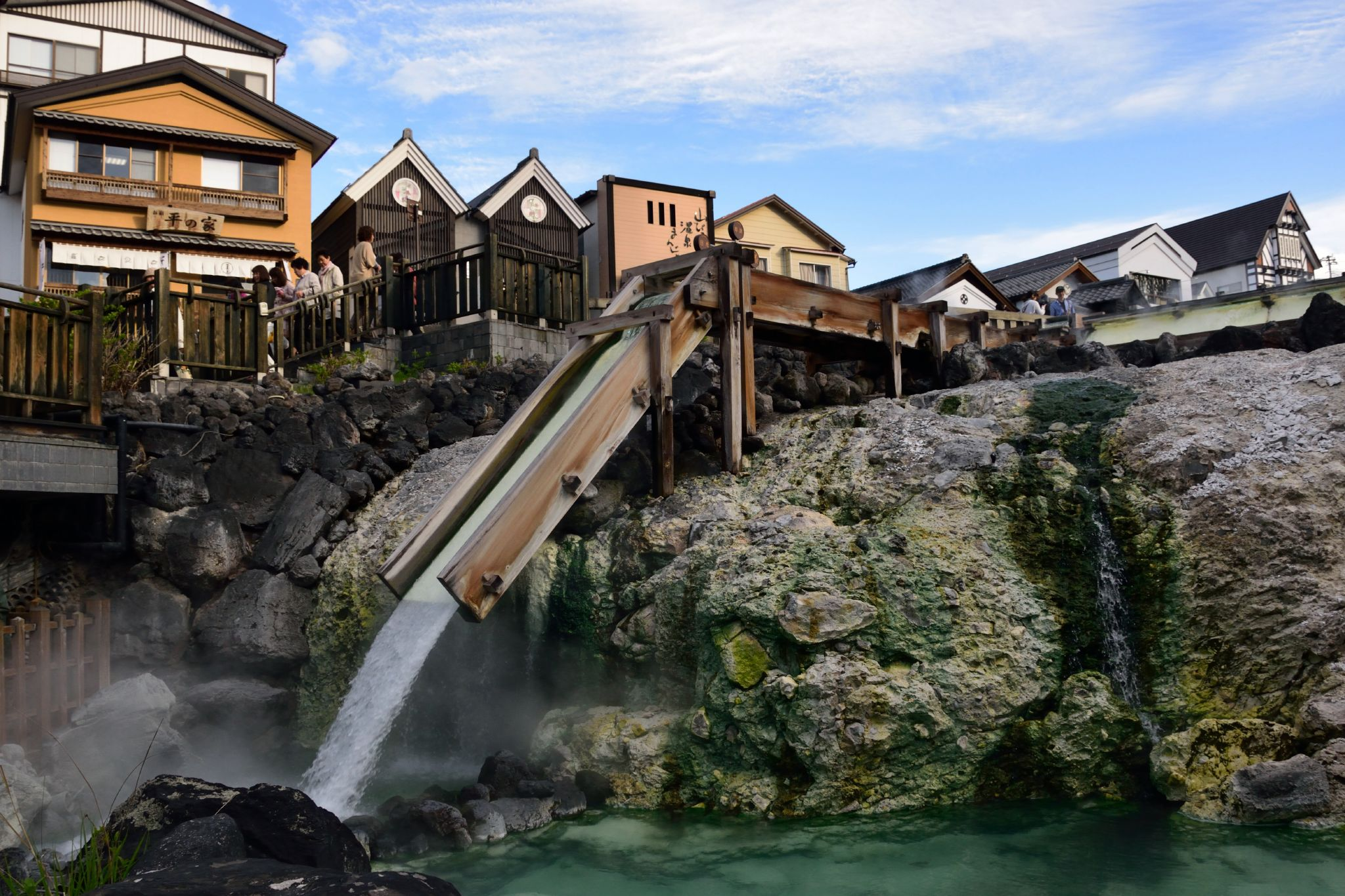 Yubatake in Kusatsu Onsen, Gunma Prefecture, Japan.